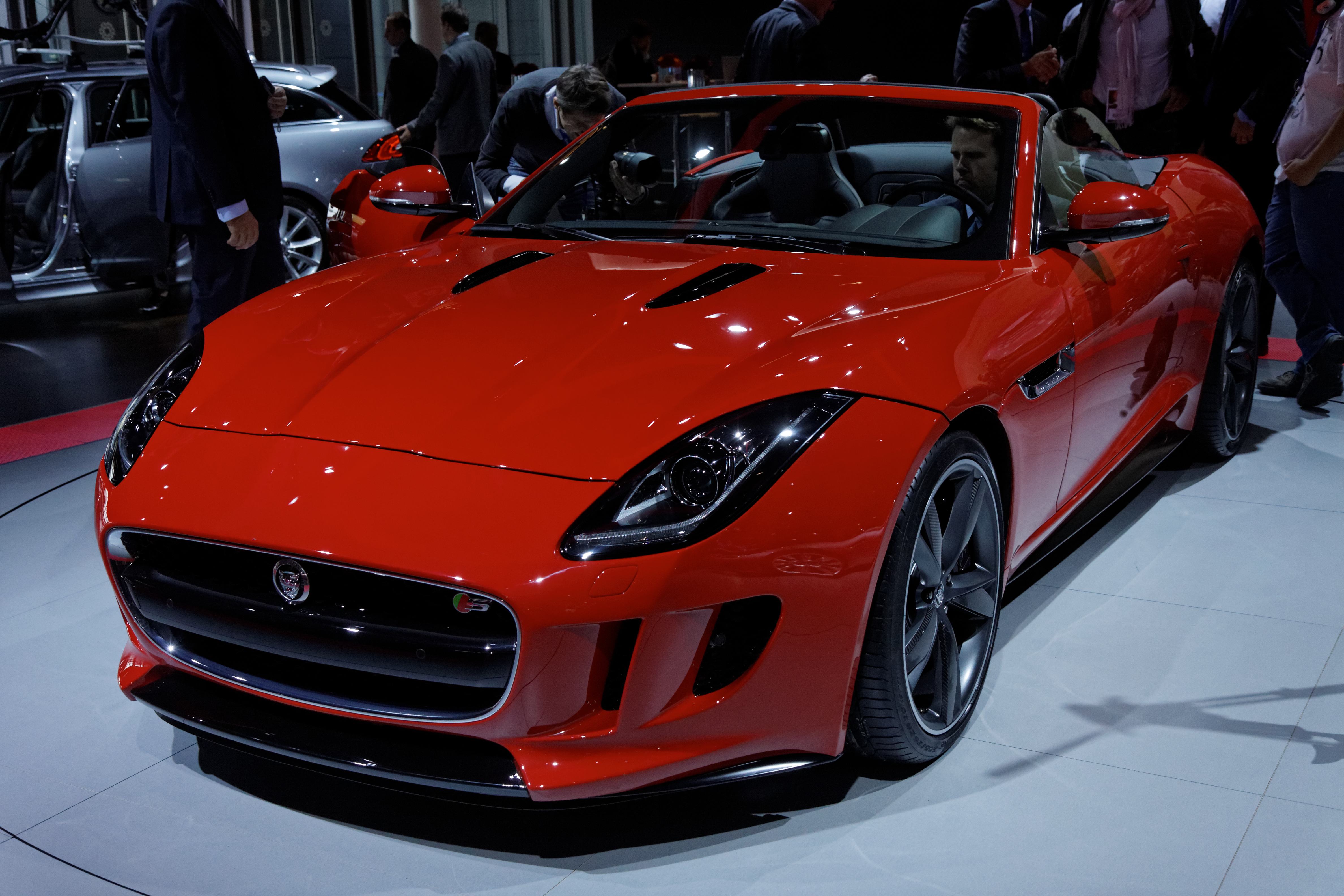 Une Jaguar F-Type présentée lors du Mondial de l'Automobile de Paris 2012.